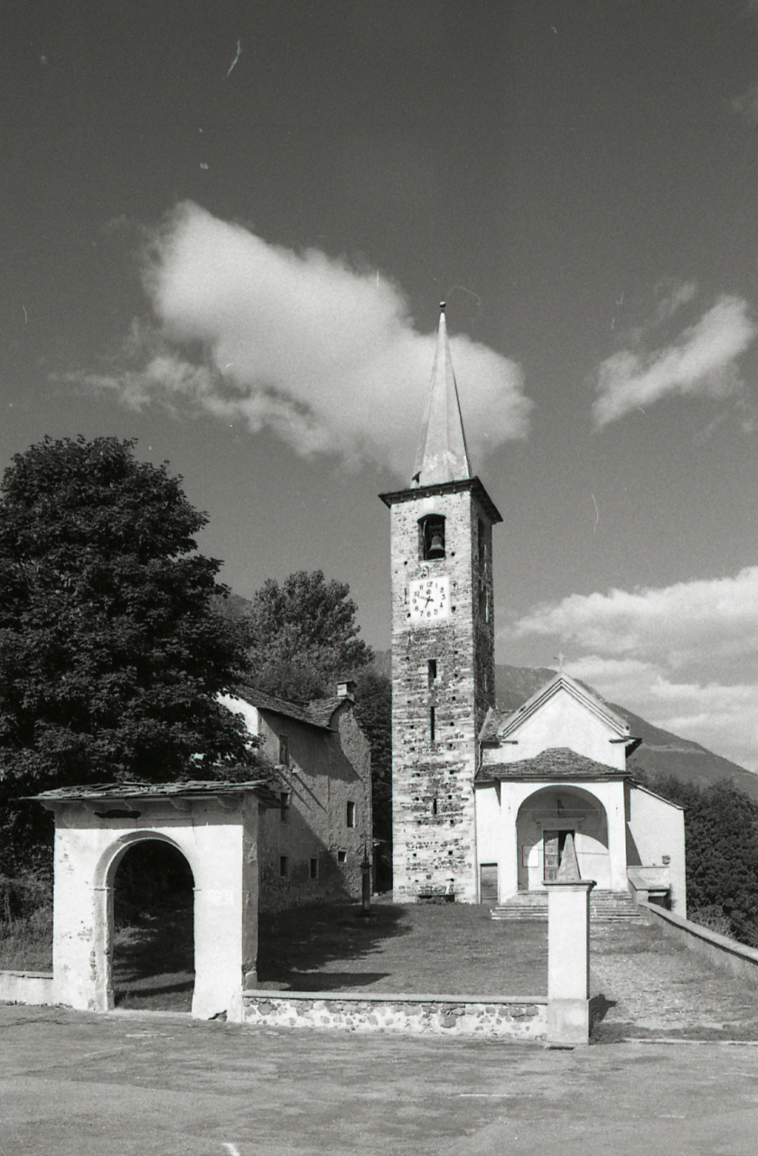 Servizio fotografico : Pieve Vergonte, 1982 / Paolo Monti. - Strisce: 3, Fotogrammi complessivi: 9 : Negativo b/n, gelatina bromuro d'argento/ pellicola ; 35 mm. - ((Sul portanegativi: N[I]K[MA]T FP4 e iscrizione: "Megolo 20/28". - Confronta scheda 3835Lpbn20A-28A. - Occasione: Documentazione per la pubblicazione: Alberti Luigi, Rainaldi Giancesare, Rizzi Enrico (a cura di), "Elogio del Lago d'Orta", Anzola d'Ossola-Valstrona, Fondazione arch. Enrico Monti-Lo Strona, 1983. - Fonte: Agenda di Paolo Monti: Nikon Leika 3001-/ Monti 1978 (1978-1982), presso Archivio Paolo Monti